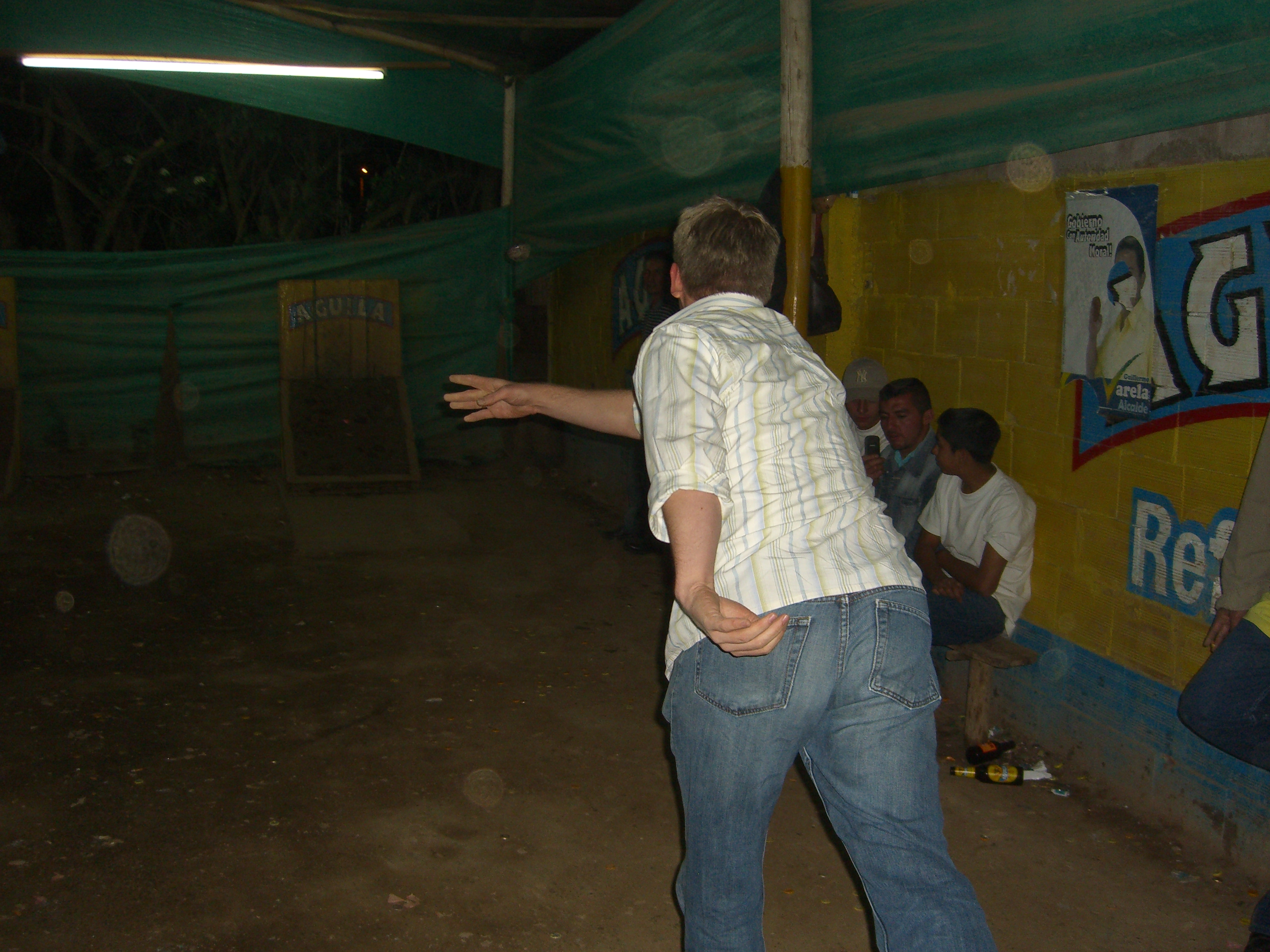 CIMG0984